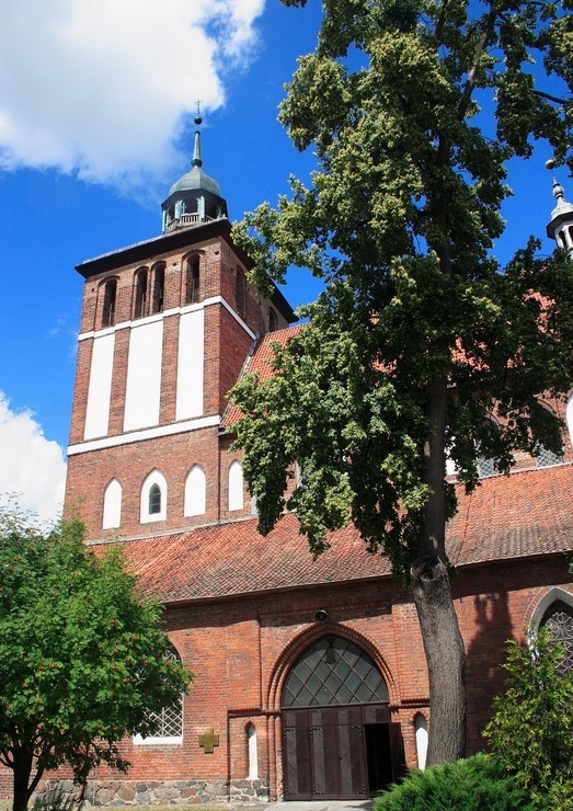 Bartoszyce - miasto w woj. warmińsko-mazurskim, w powiecie bartoszyckim